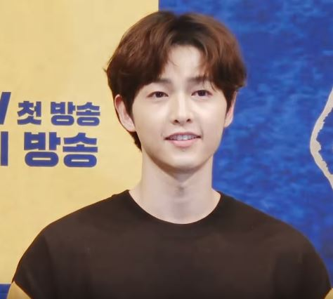 tvN 주말드라마 ‘아스달 연대기’(연출 김원석/극본 김영현, 박상연)제작발표회가 28일 오후 서울 강남구 논현동 임피리얼팰리스에서 열렸다.